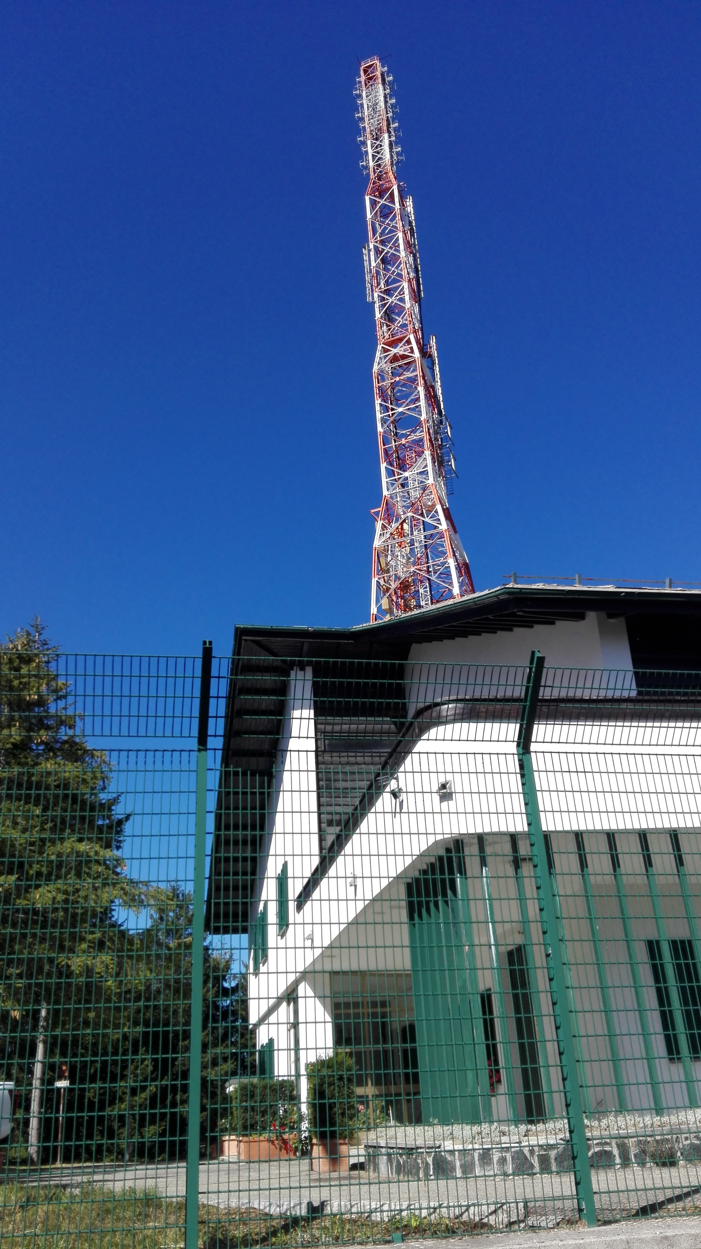 Trasmettitore storico della Rai di Monte Penice, da questa antenna veniva irradiato per oltre 50 anni il famoso canale B di Rai 1 spento il 26 novembre del 2010 con il passaggio al digitale.